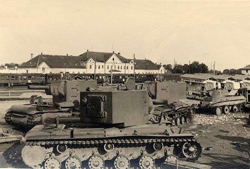 Беларуская (тарашкевіца): Ліда (Lida), вуліца Чыгуначная (vulica Čyhunačnaja). Чыгуначная станцыя1